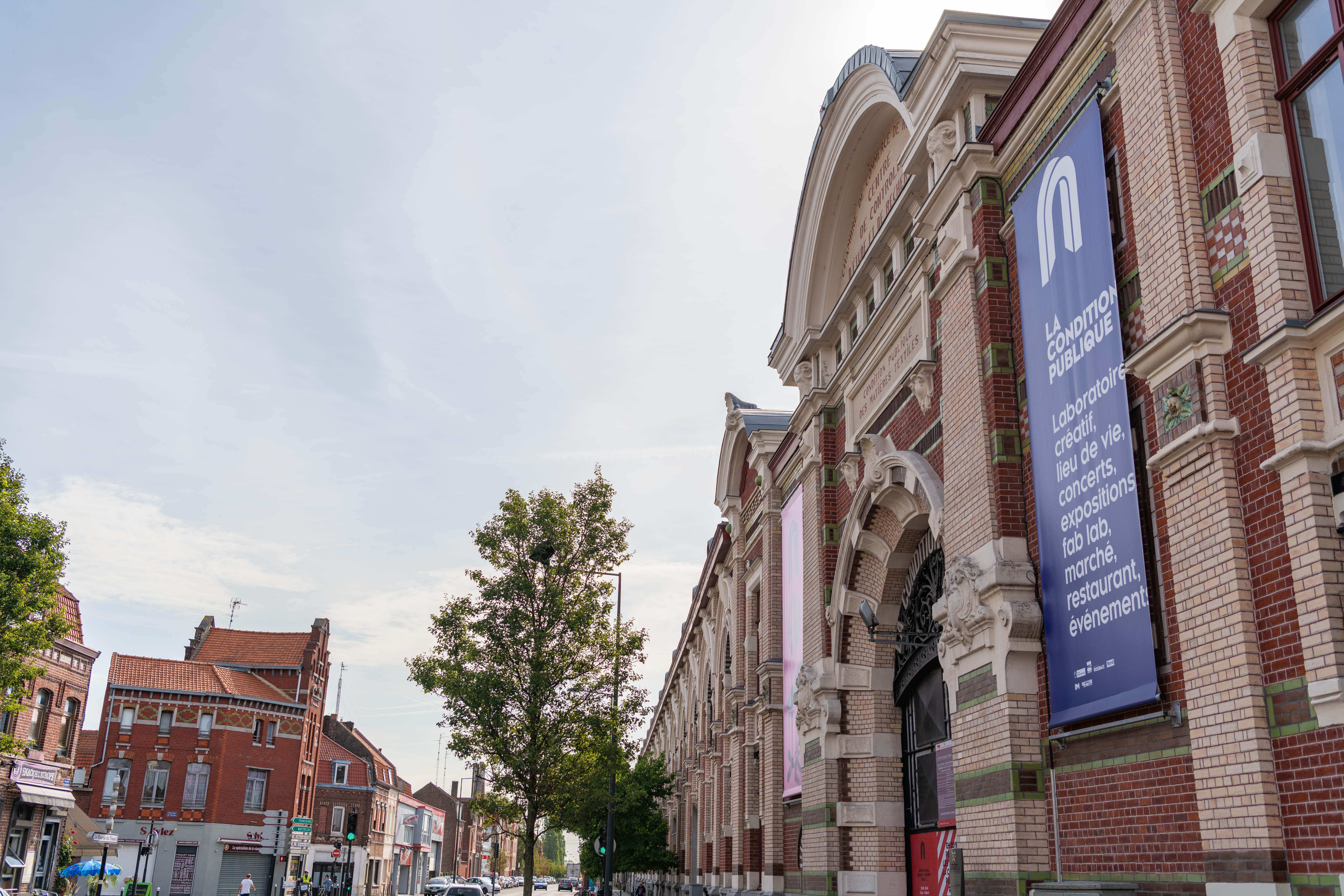 Le bâtiment de la condition publique place Faidherbe. Patrimoine. Bâtiment historique. Architecture.